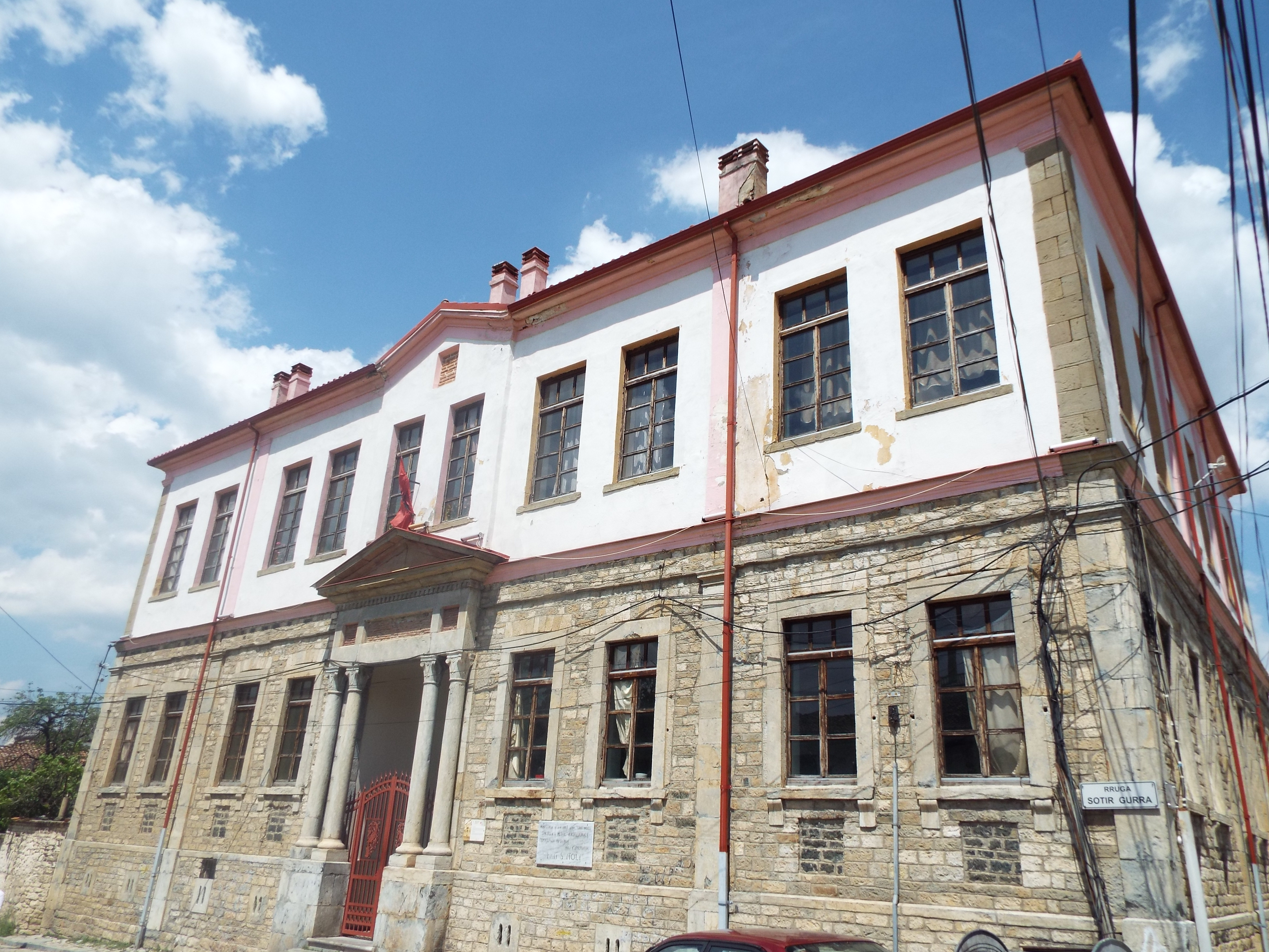 Një foto e ndërtesës së Liceut Francez, Korçë.